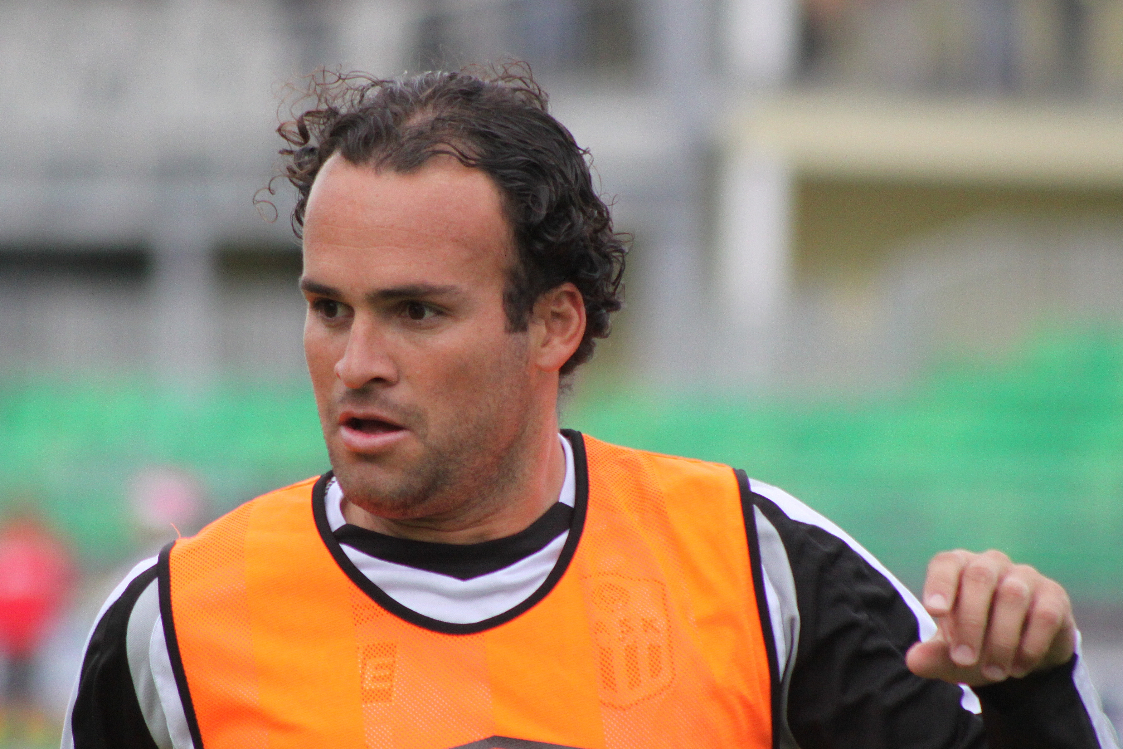 Pablo Chinchilla - costa-ricanischer Fußballspieler in Diensten des LASK Linz (quer)